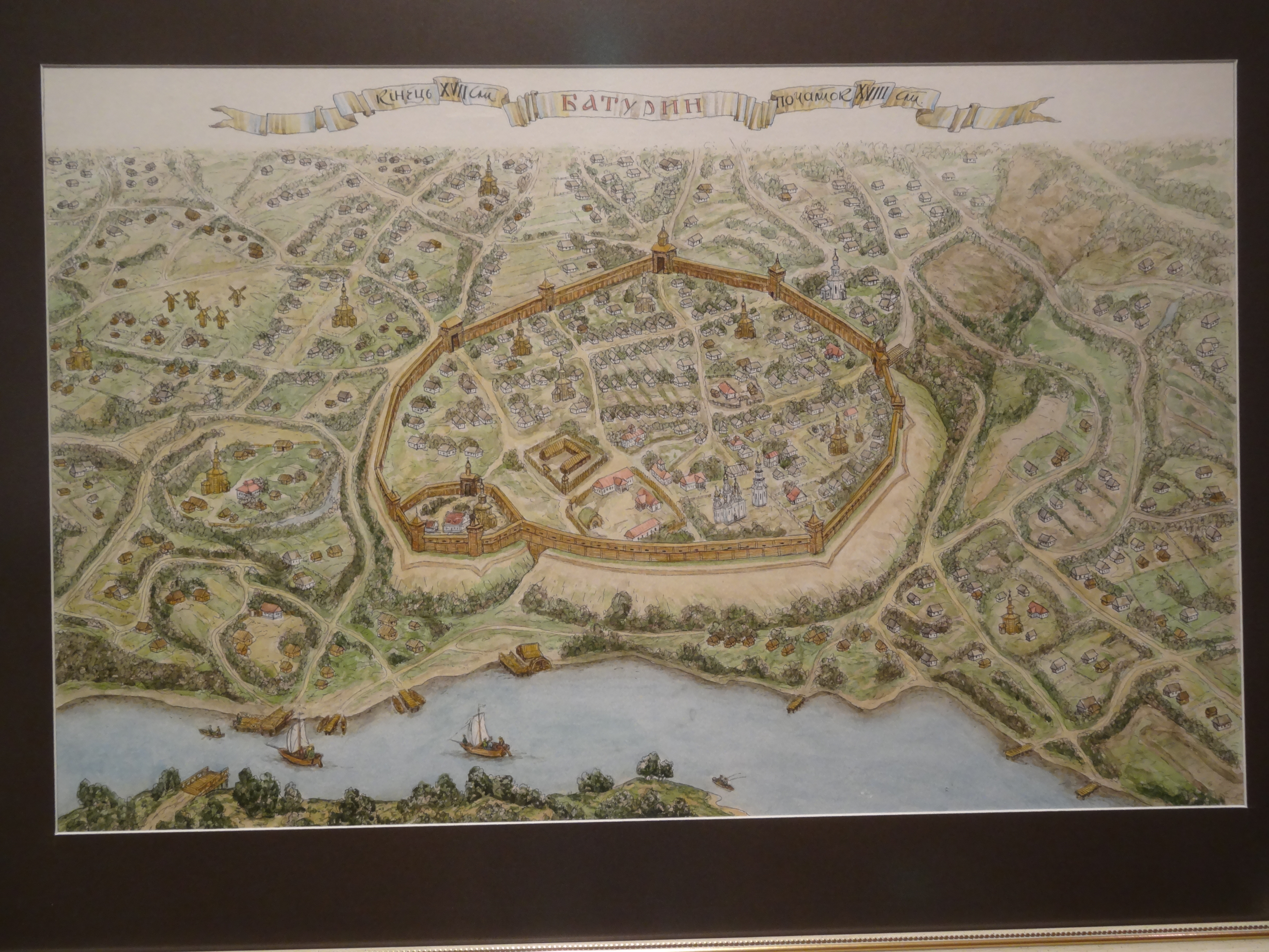 Русиньскый: кріпость Батурин